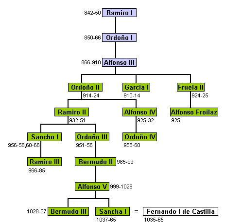 Árbol genealógico de los reyes de Asturias y de León de la casa de Cantabria.